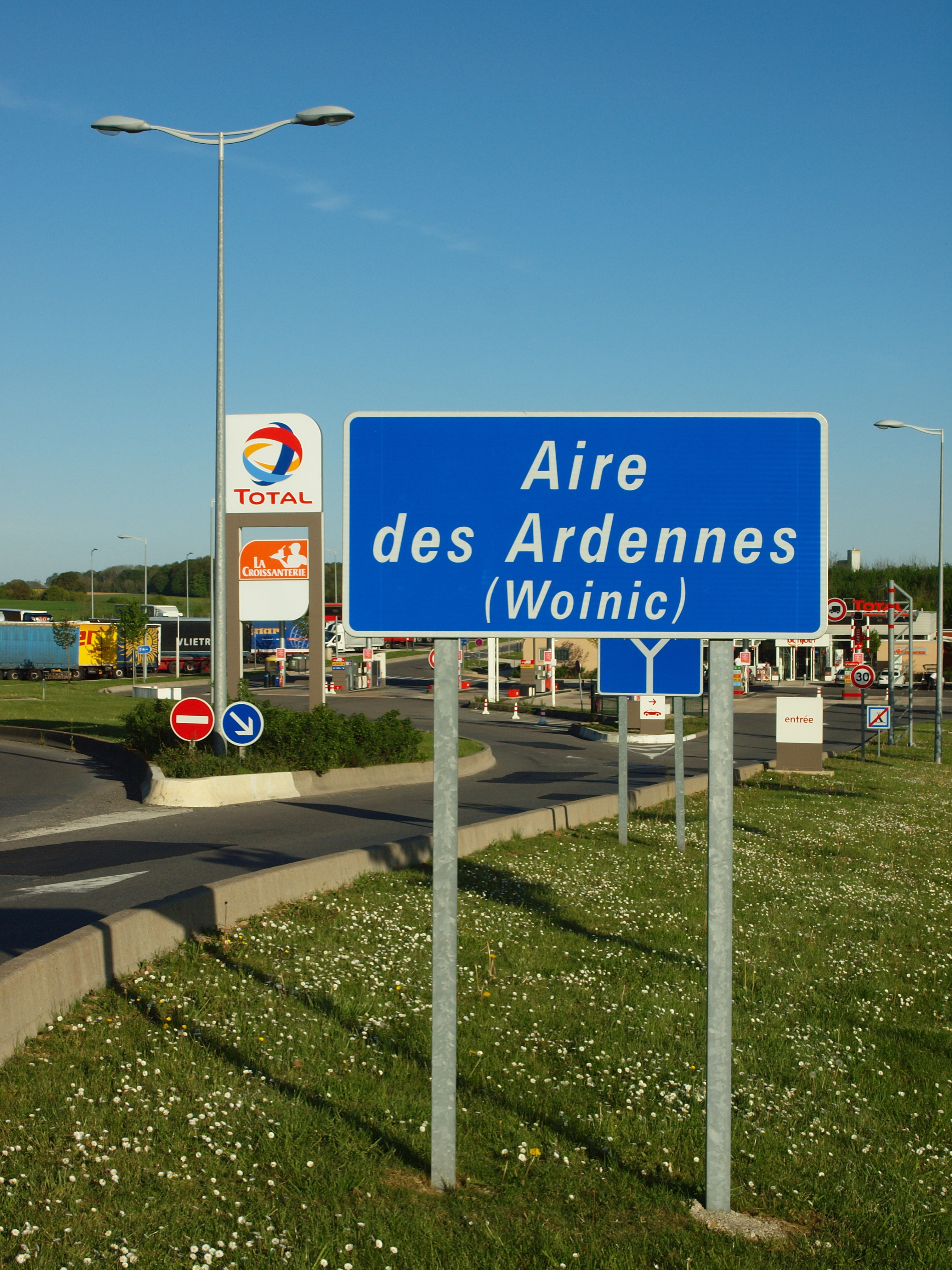 Saulces-Monclin (Ardennes, France) ; station-service de l'autoroute (Aire des Ardennes / Woinic)